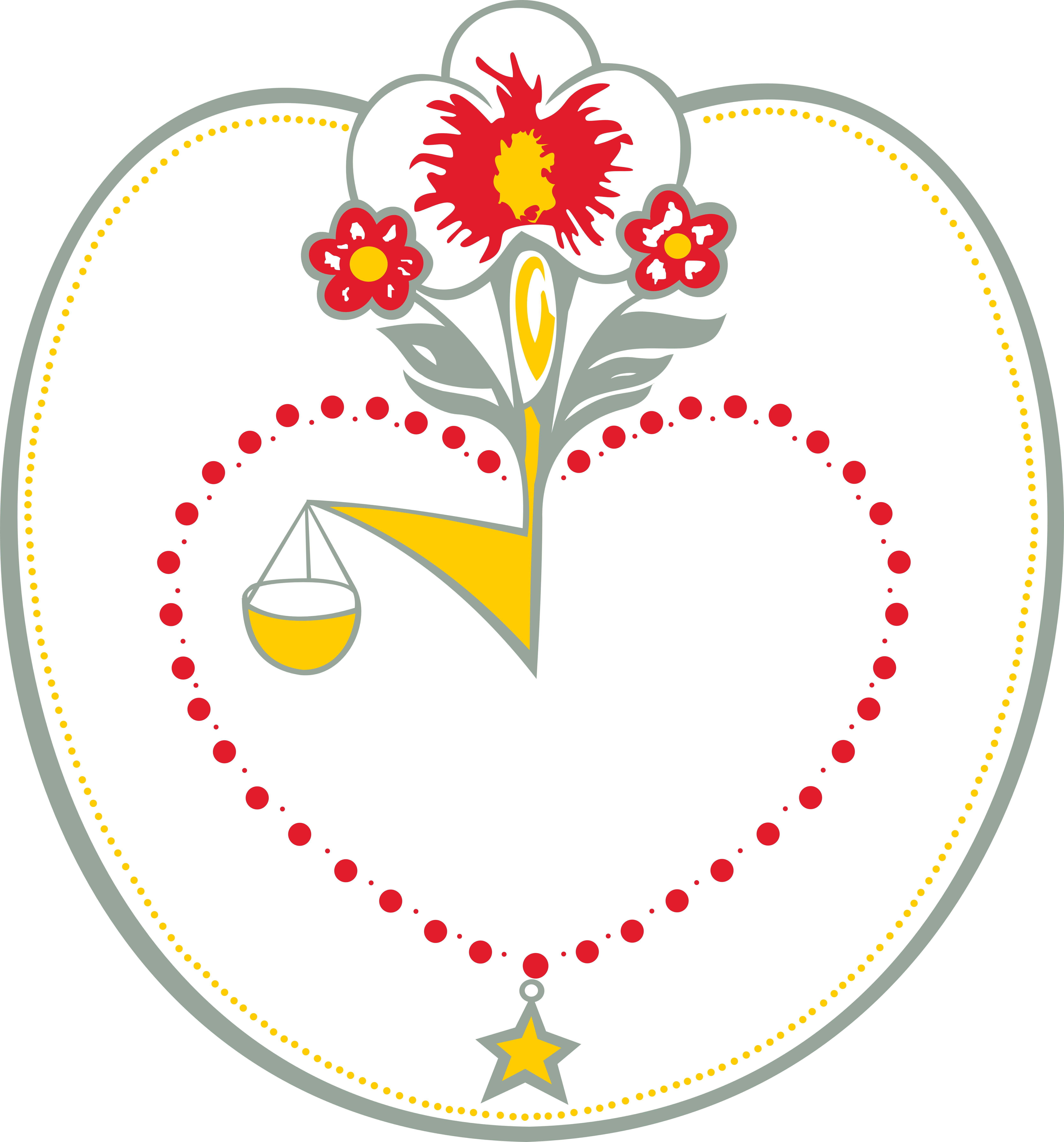 ehem. Wappen schönerstadt